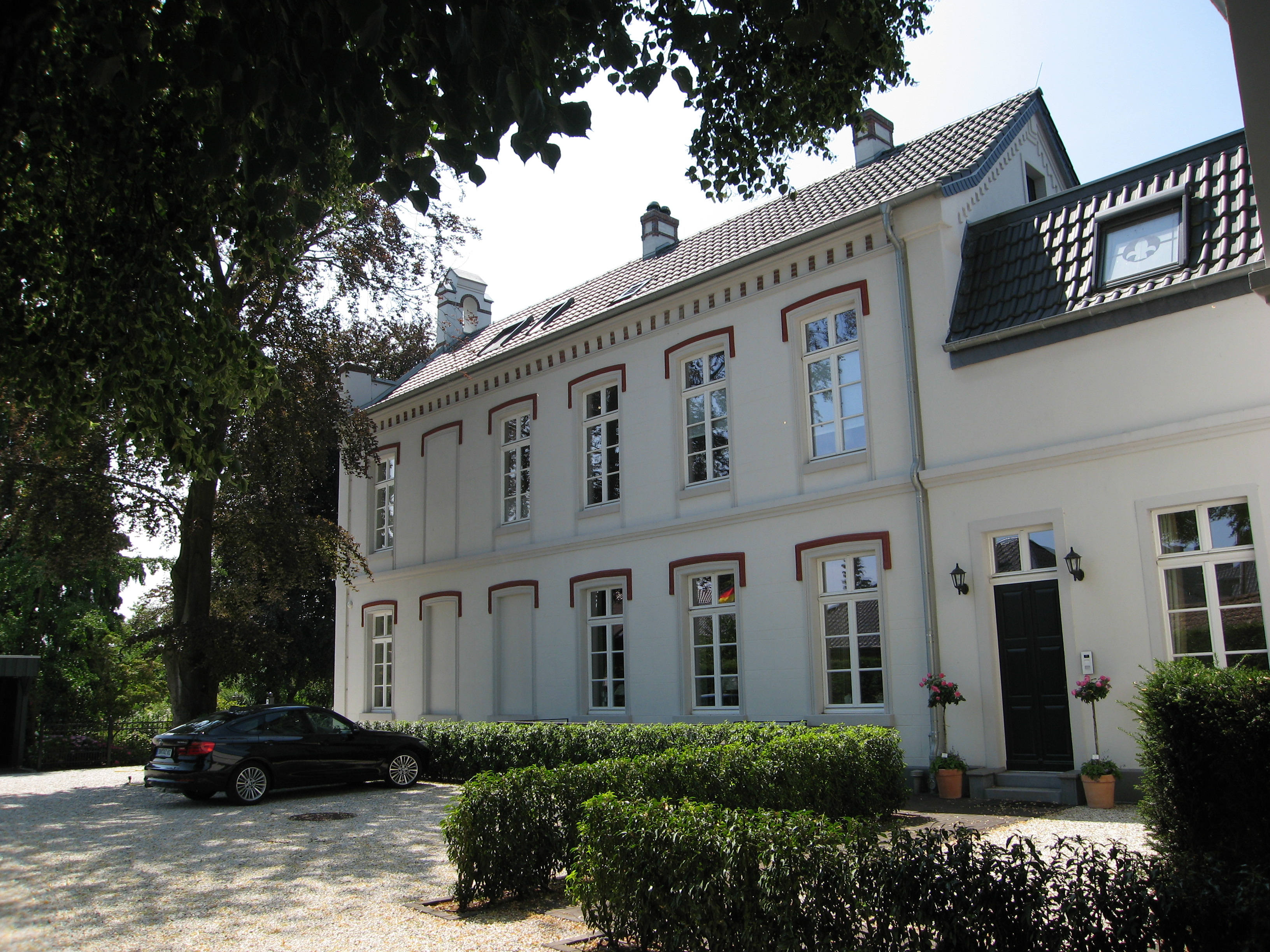 Haus Heidefeld, Baudenkmal seit 04.10.1984This is a photograph of an architectural monument.